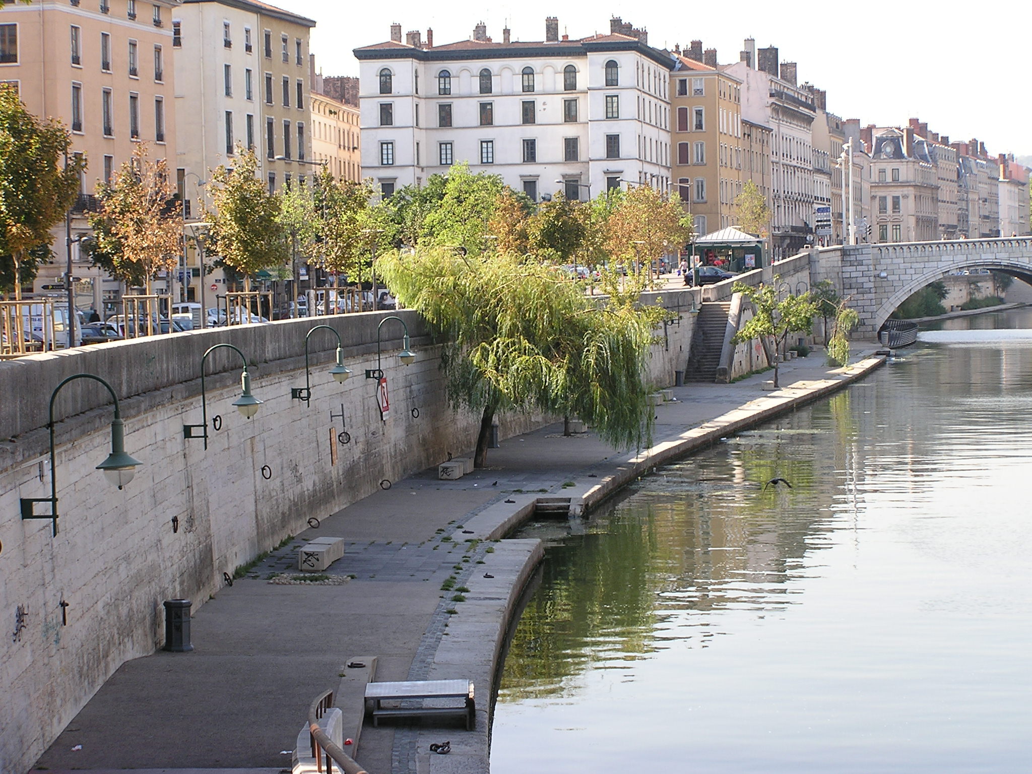 Quai des Célestins à Lyon ; à droite : la Saône et la première arche du pont Bonaparte